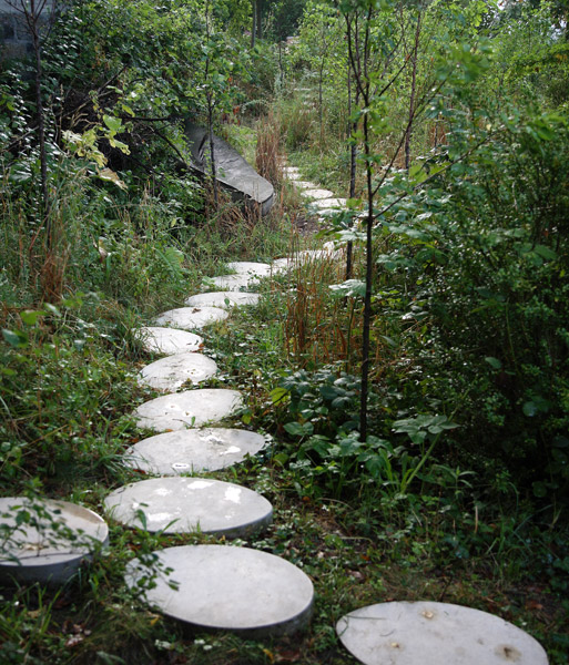 Vortex Garten Darmstadt